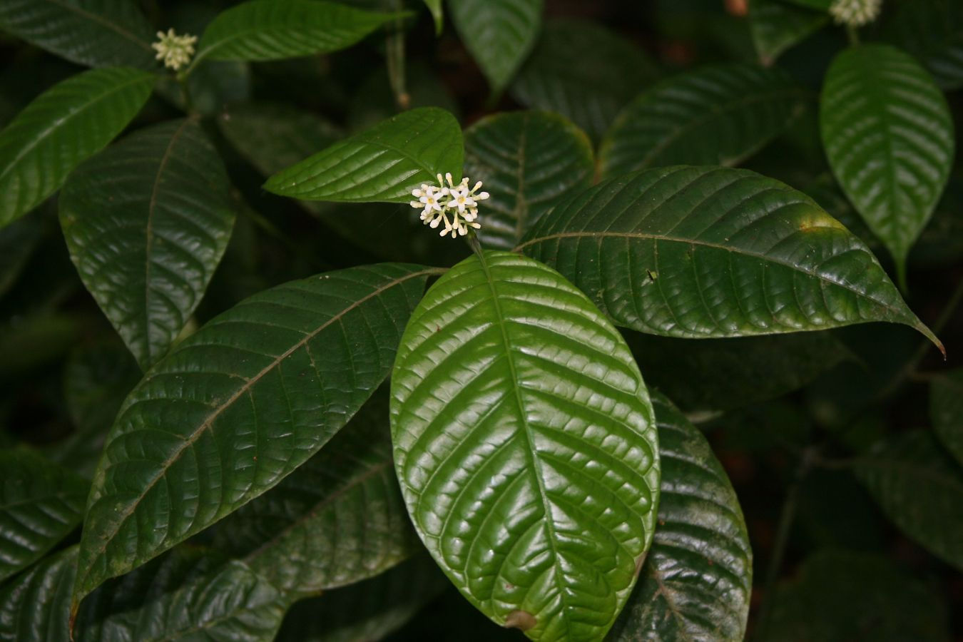 Psychotria acuminata, Kaffeegewächse (Rubiaceae) - Costa Rica: Prov. Puntarenas, Hacienda Barú NW Dominical, Canal Trail